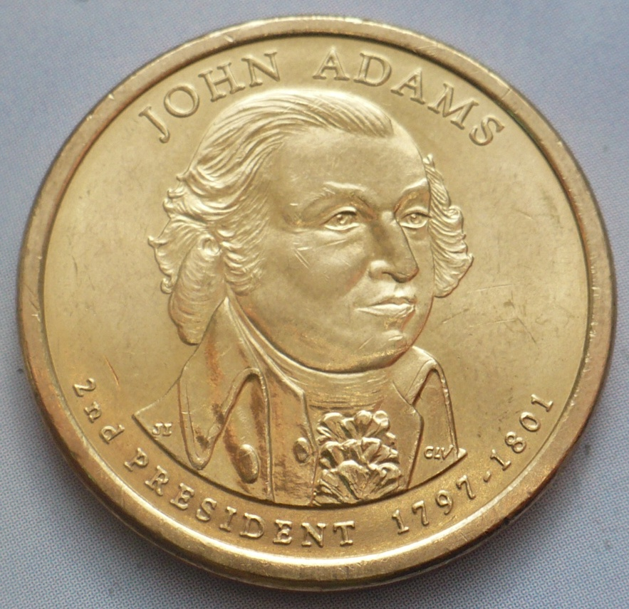 Изображение/Монета 1 доллар США